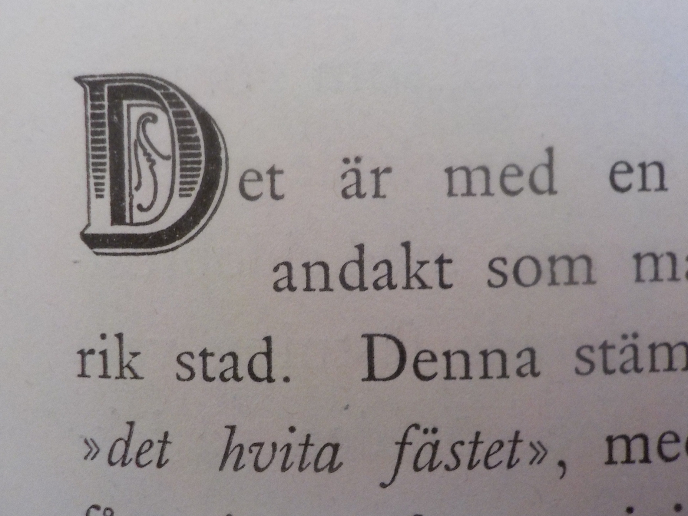 Typsnitt ur tryckt bok.